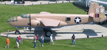 B-25J-30NC 44-86843 Grissom AFB Museum